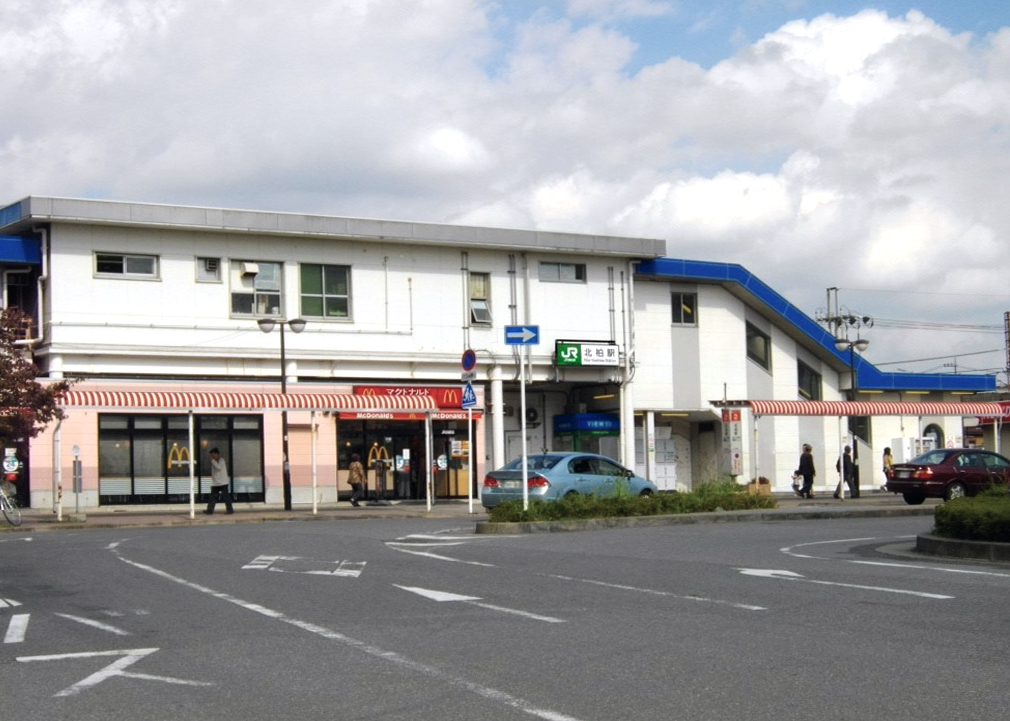 北柏駅南口(cropped)